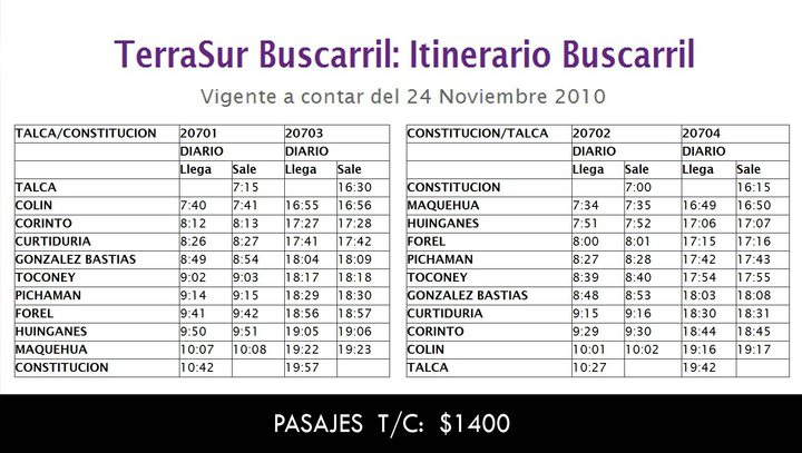 HORARIOS OFICIALES TERRASUR - PUBLICADOS NOV 2010